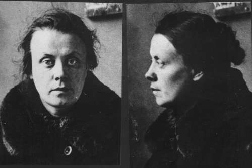 Маргарита Робертовна Герштейн, эсерка, жертва репрессий, жена Льва Яковлевича Герштейна (15 апреля 1877 — 1935) — эсер, член Всероссийского учредительного собрания, член ЦК партии эсеров.